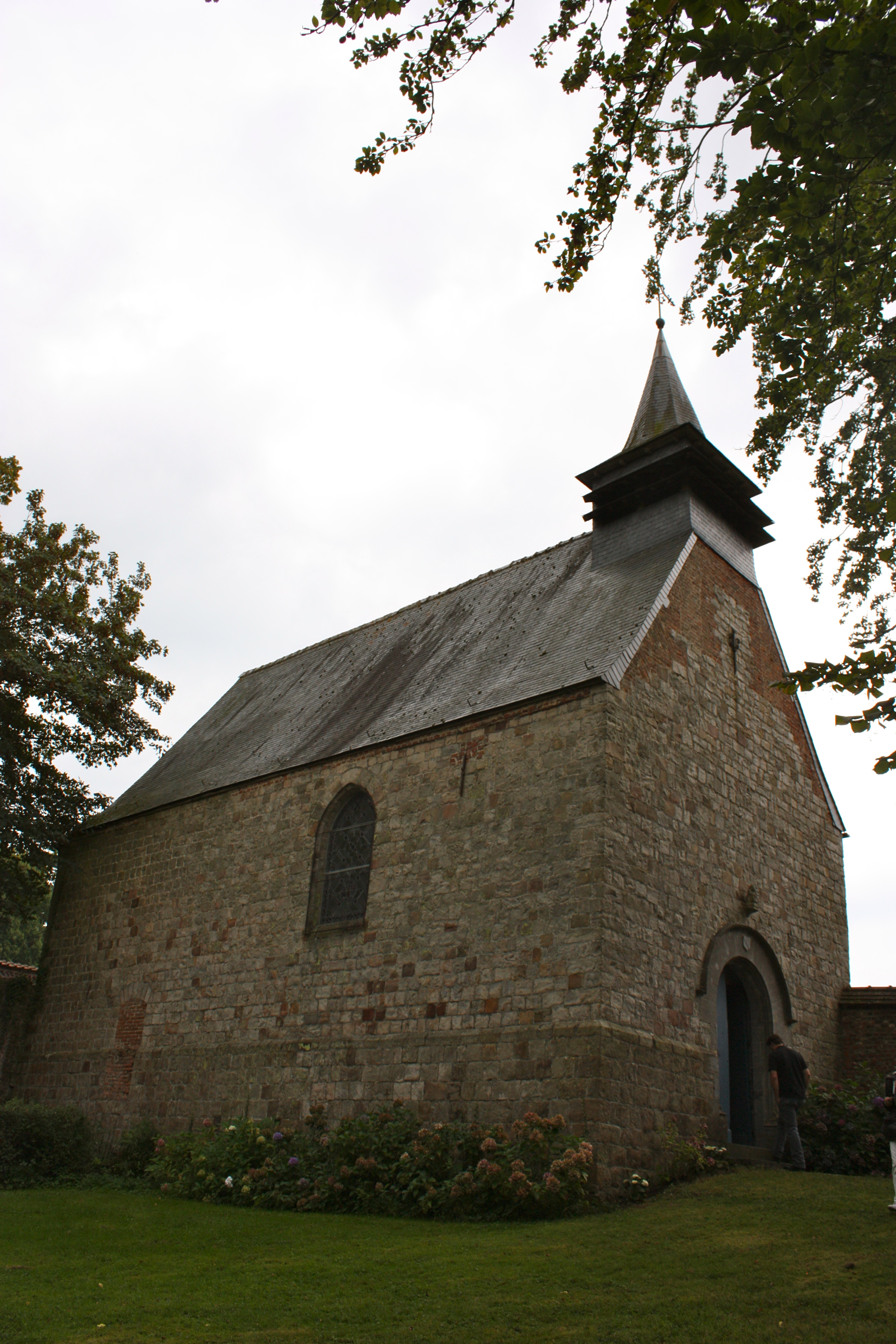 Chapelle du Château de Potelle